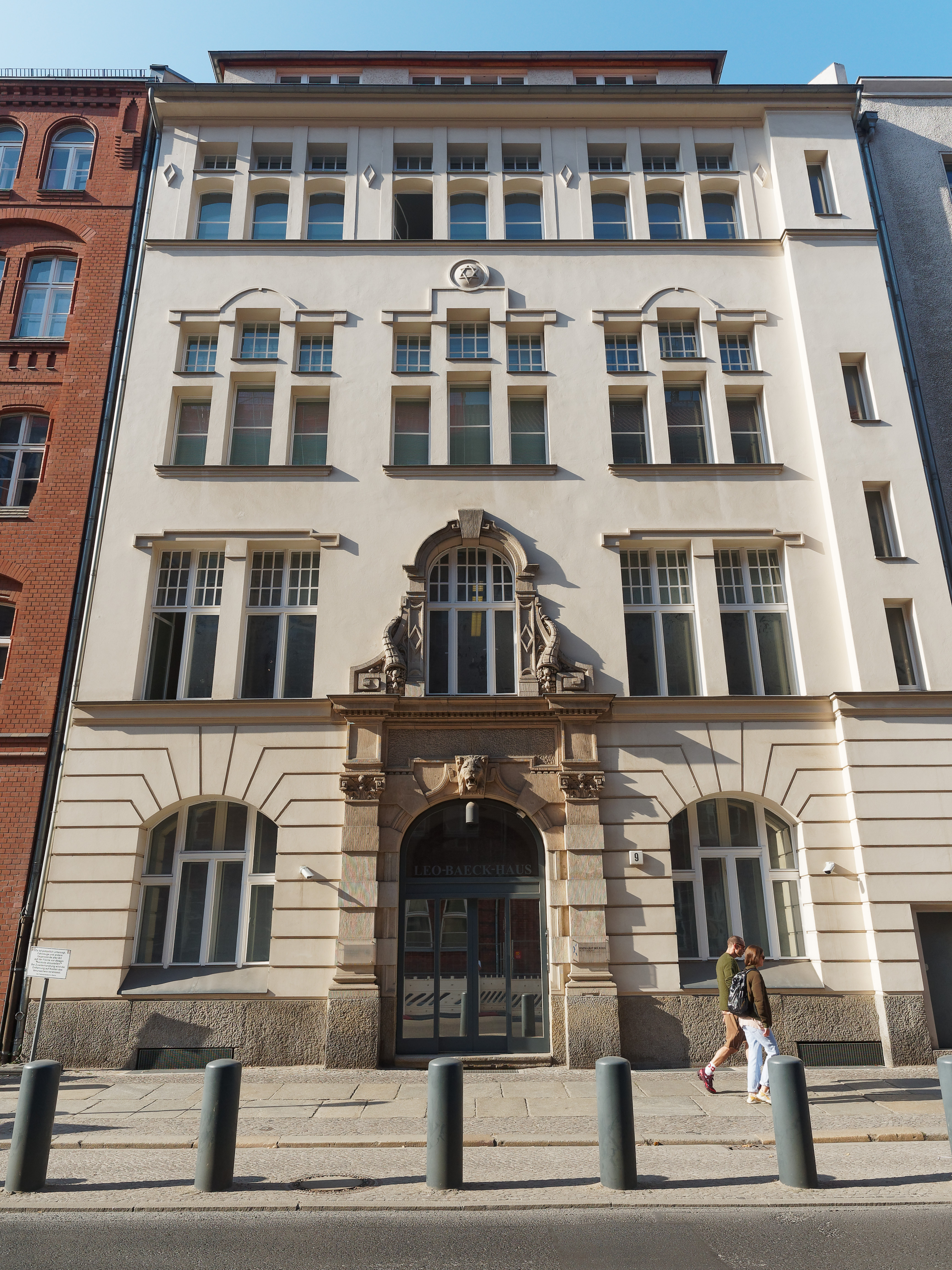 Berlin-Mitte, Tucholskystraße Leo-Baeck-Haus. Im Haus befindet sich die Hochschule für die Wissenschaft des Judentums. Es ist auch der Sitz des Zentralrates der Juden in Deutschland.This is a photograph of an architectural monument.